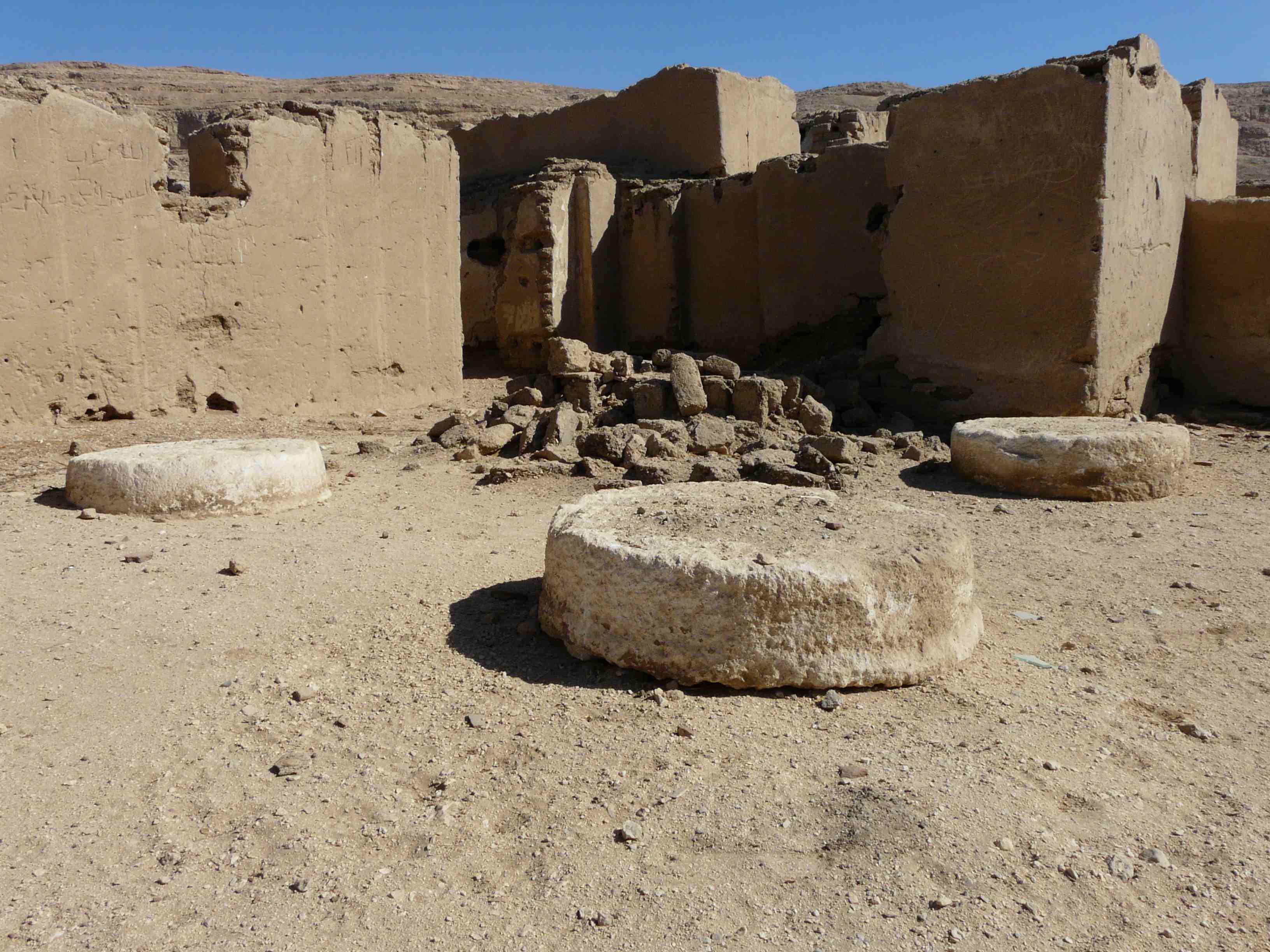 Amarna - Quartier résidentiel nord